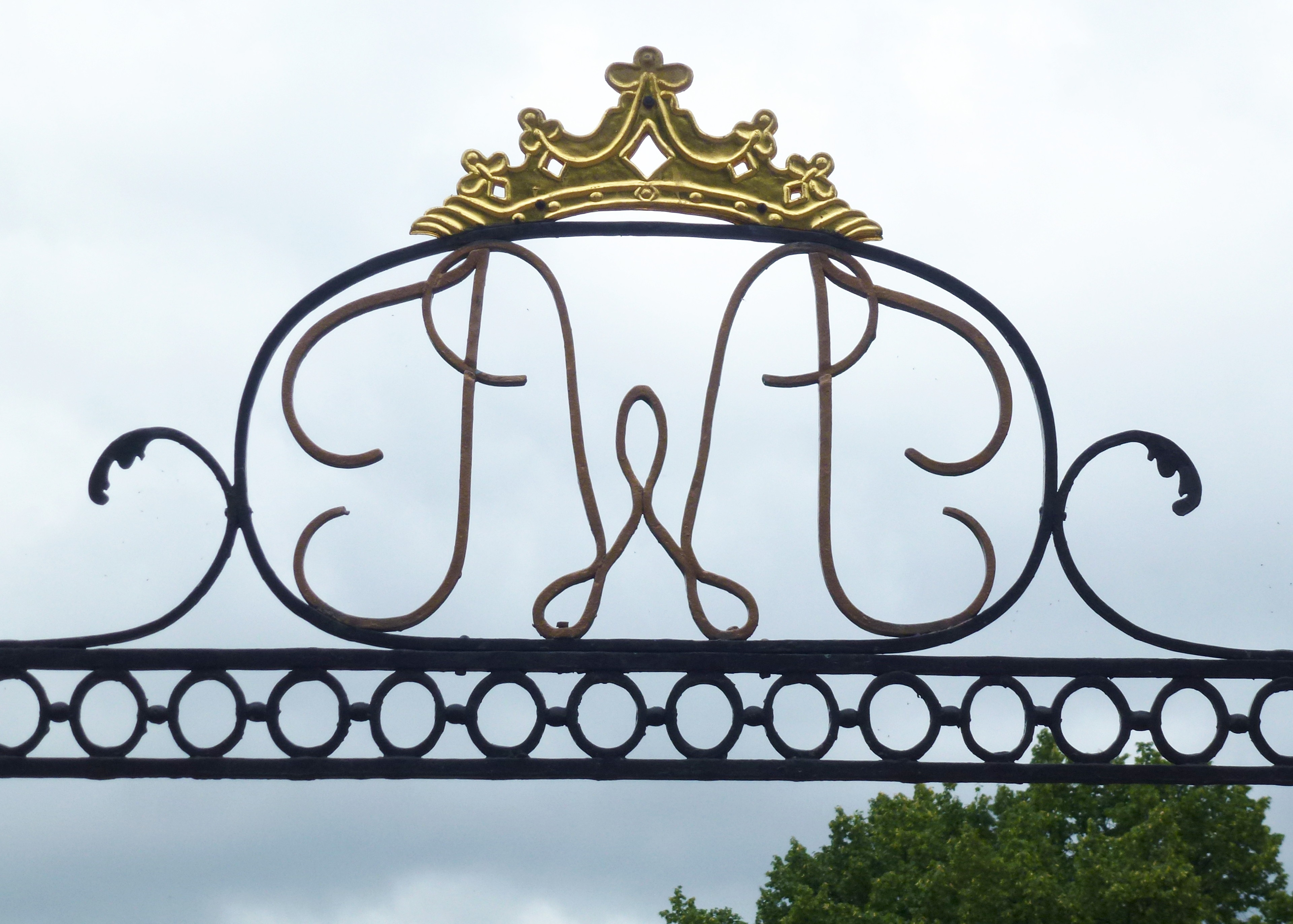 Johan Wattrangs spegelmonogram vid Edsbergs slott